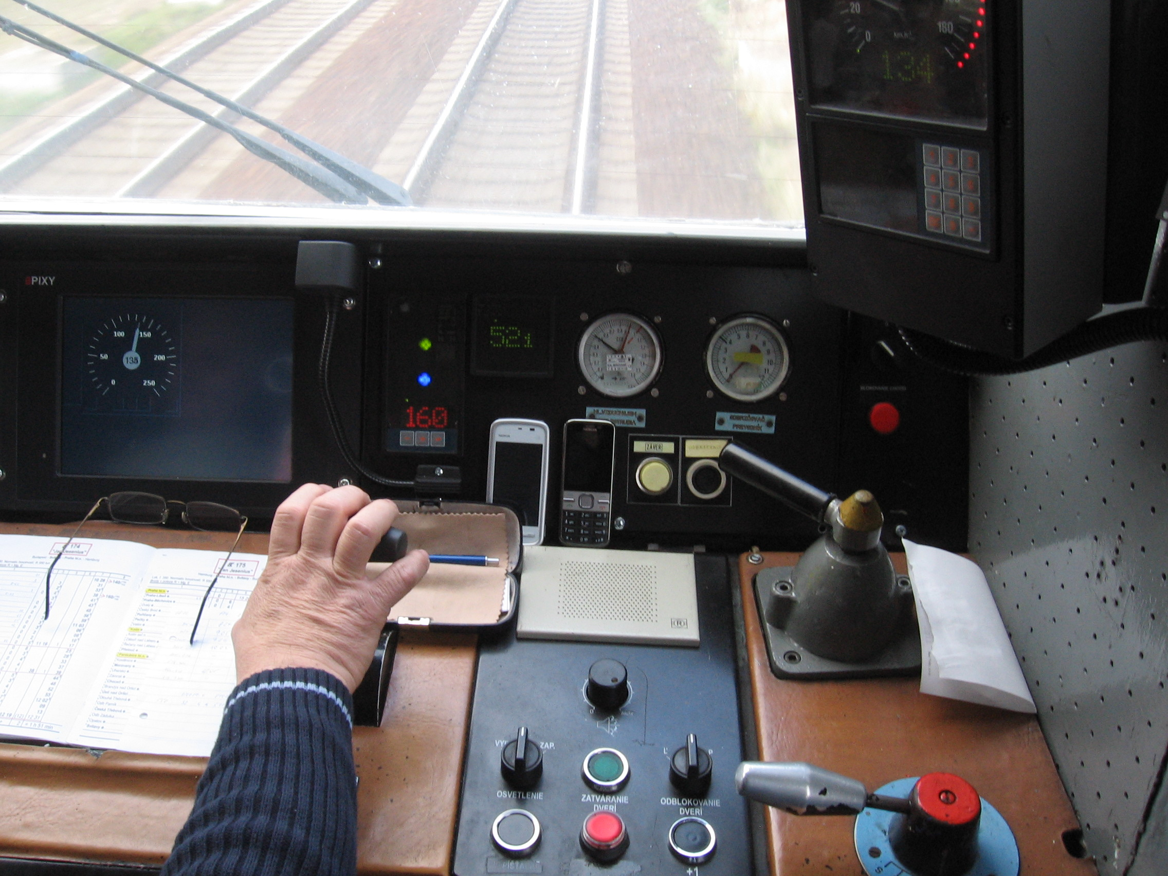 350.019 ZSSK - někde mezi Kolínem a Poříčany